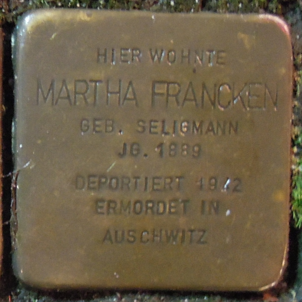 Stolperstein Geldern Issumer Straße 1 Martha Francken